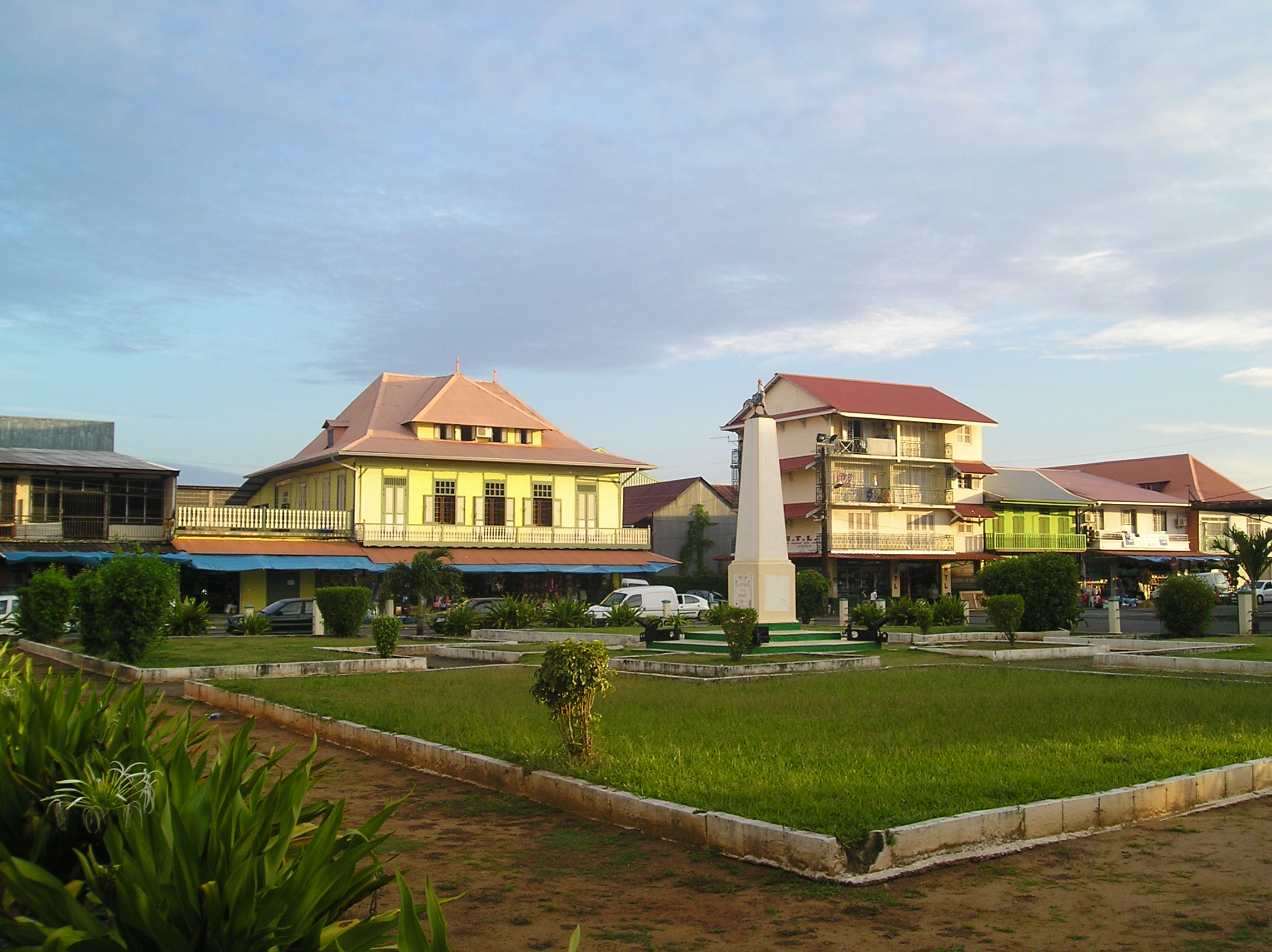 Place du Coq Cayenne